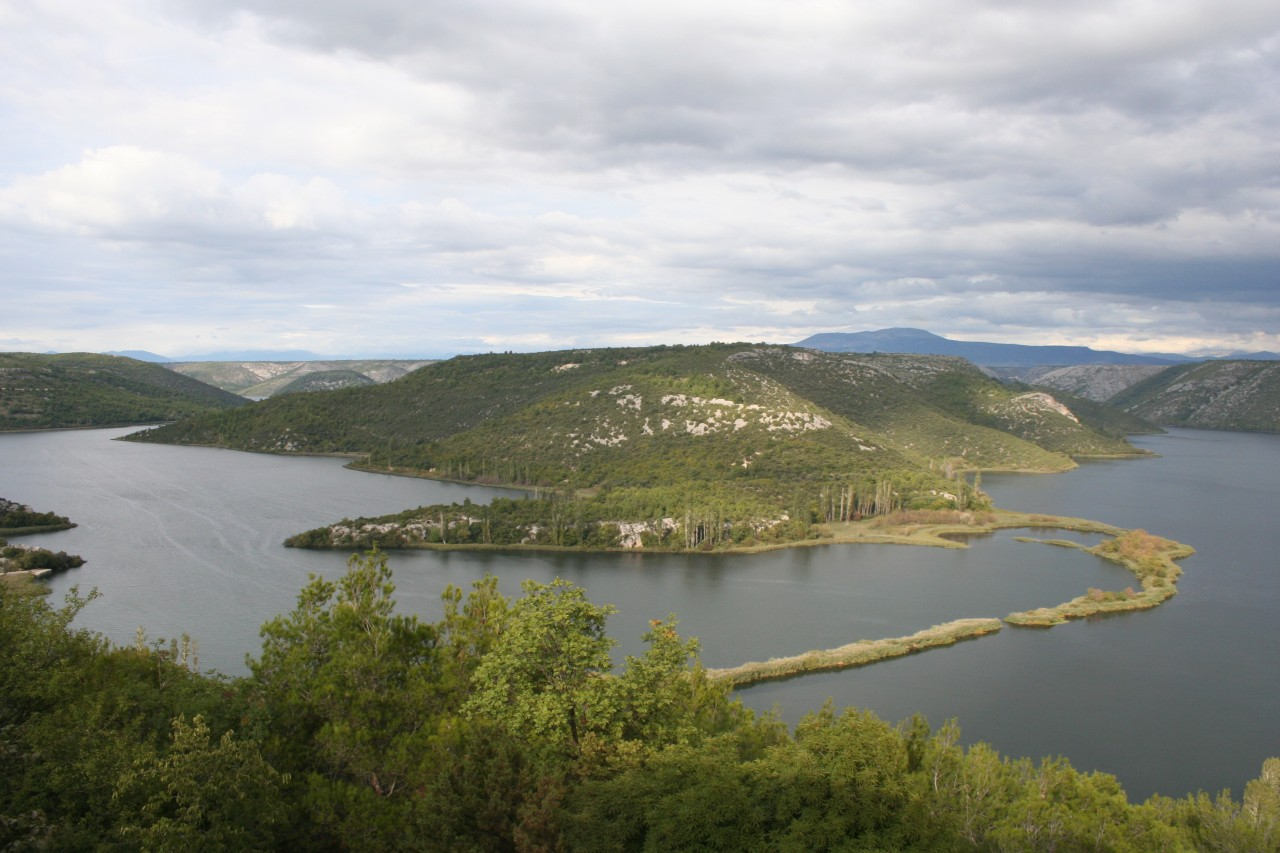 Maciej Piekielnik, taken on river Krka